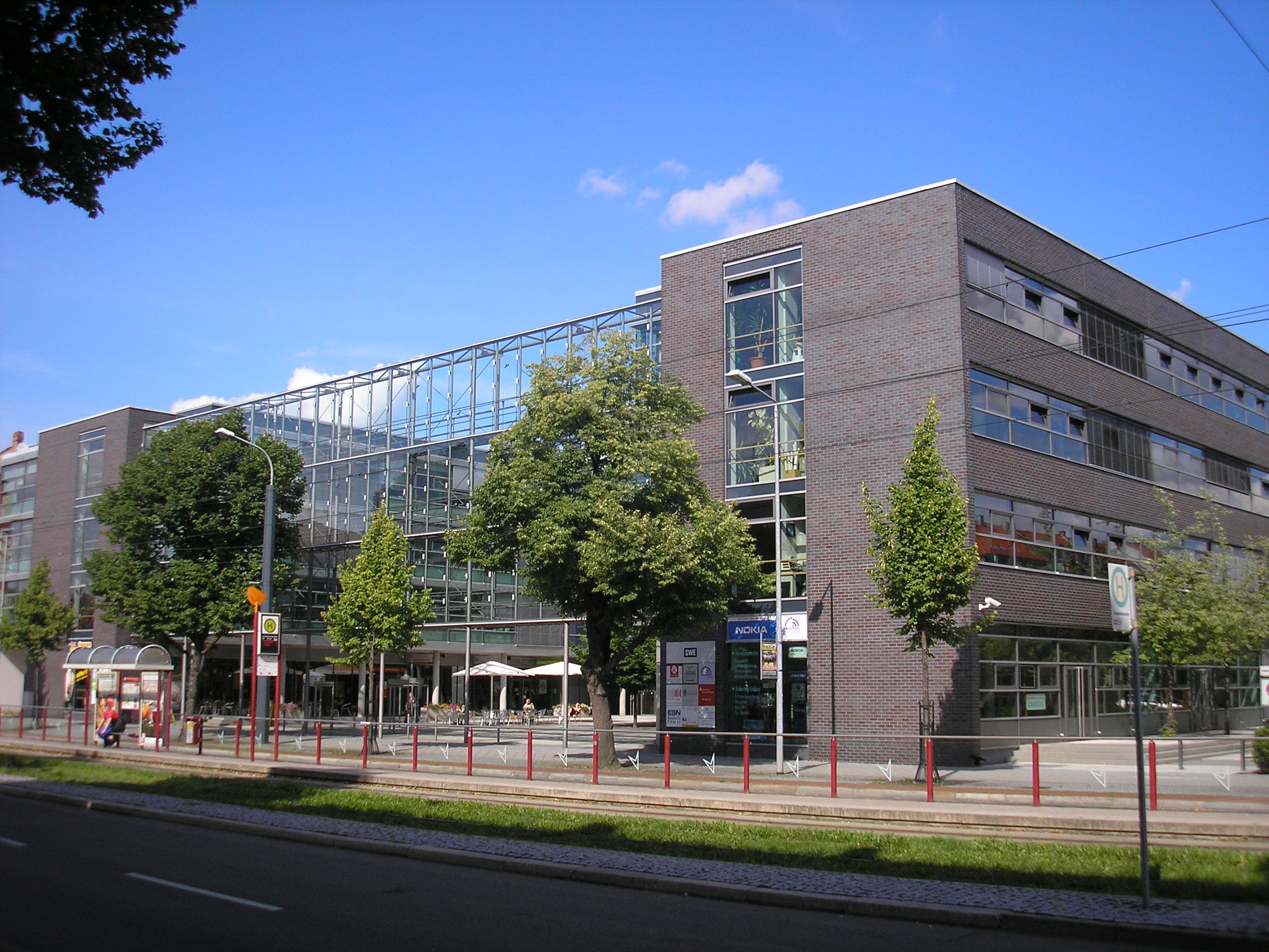 Die Verwaltung der Stadtwerke in Erfurt